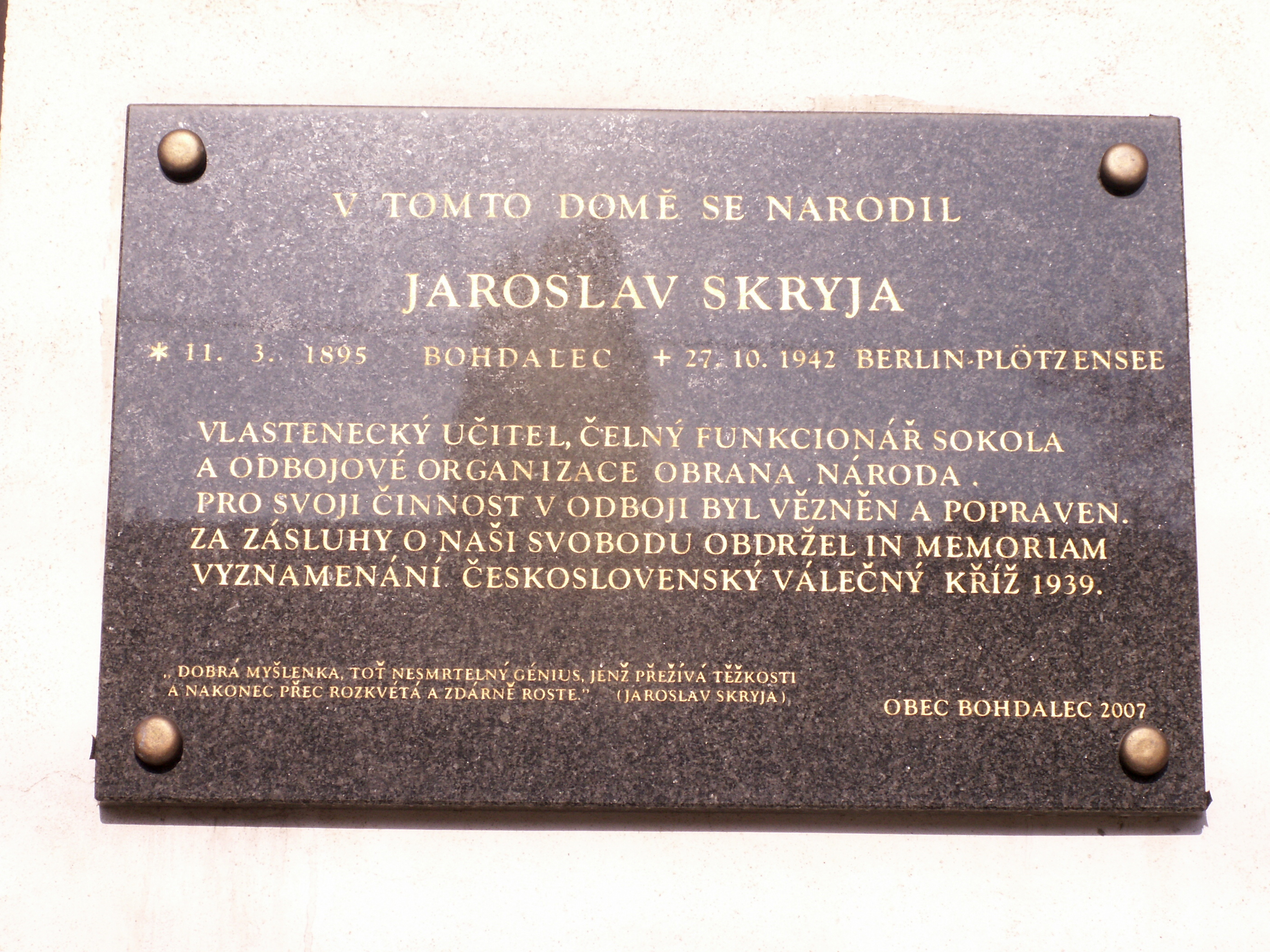 pamětní deska - Jaroslav Skryja (1895-1942), učitel, představitel Sokola a Obrany národa, popraven nacisty, rodák z Bohdalce, okres Žďár nad Sázavou, kraj Vysočina